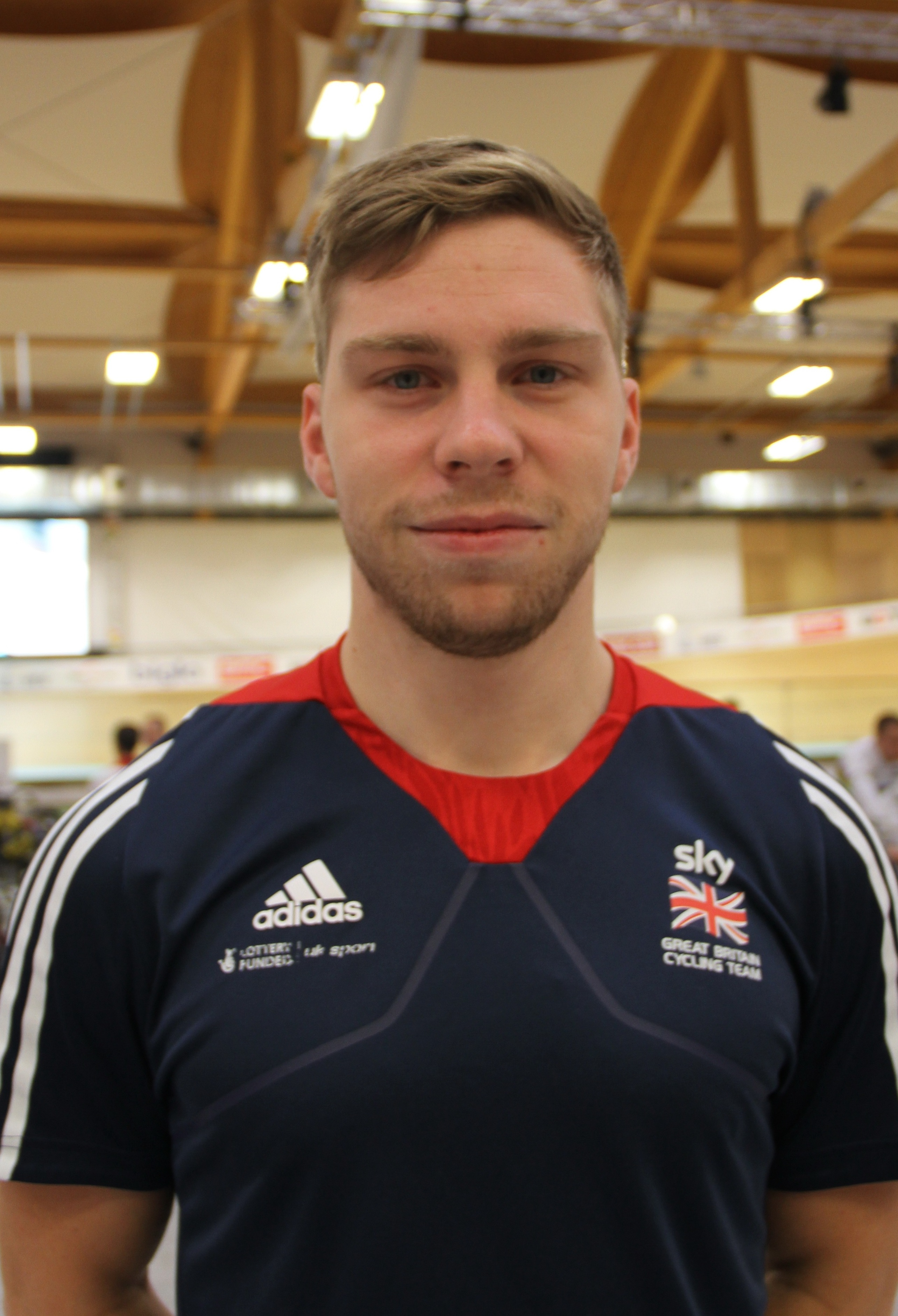 Philip Hindes, britischer Radsportler The making of this document was supported by the Community-Budget of Wikimedia Germany.